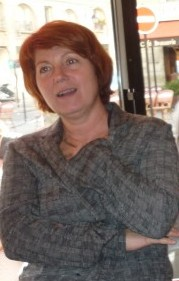 Véronique Genest, comédienne française.